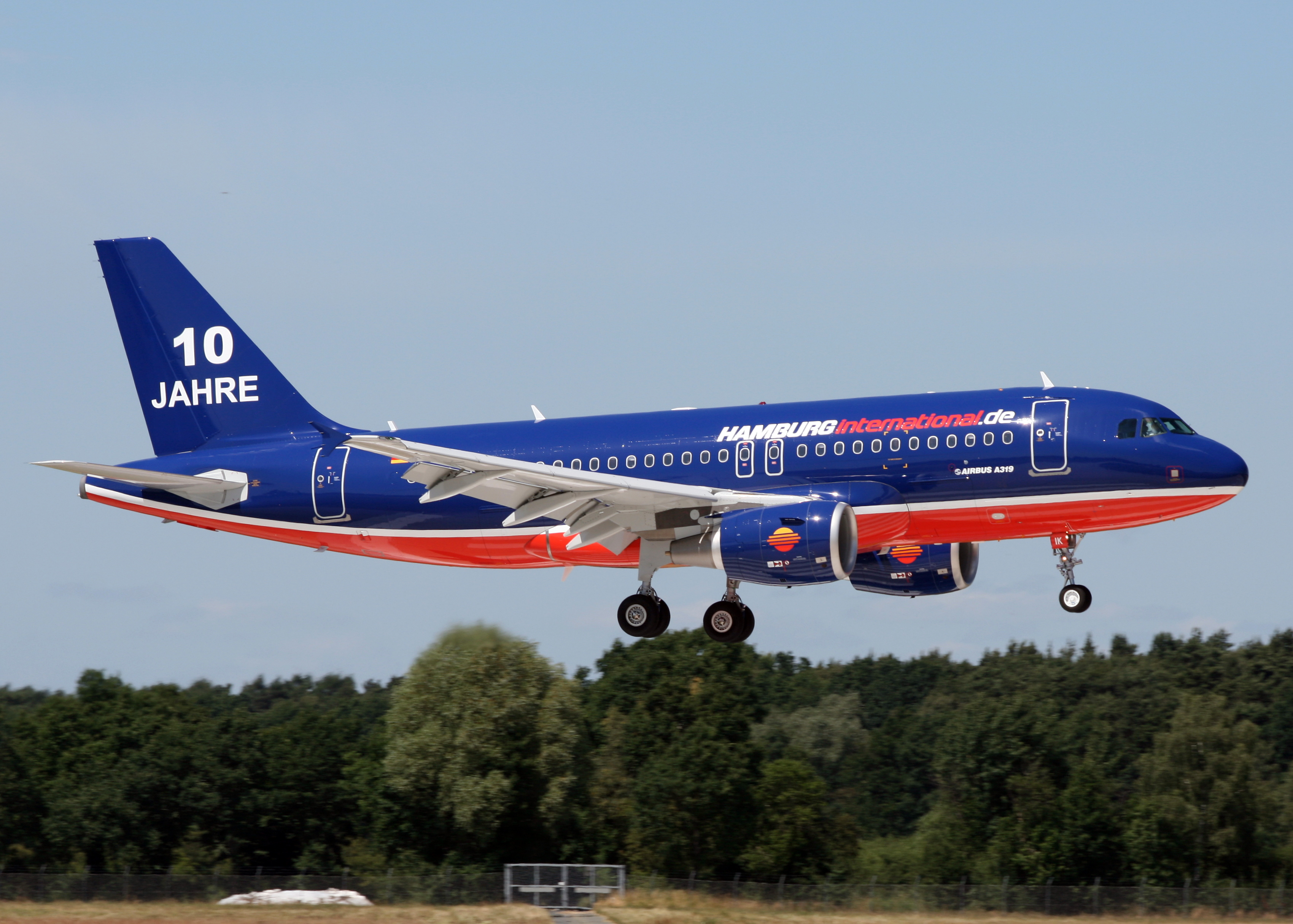 Haj/Eddv 24-06-08